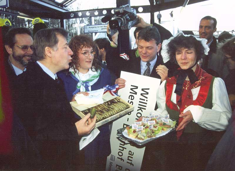 Autor: Ralf Roletschek Marcela Eberhard Diepgen (2. v. l.) bei der Eröffnung der S-Bahn- Strecke Olympiastadion am Messebahnhof Bild ist selbst aufgenommen, das genaue Datum kenne ich leider nicht mehr. Wurde von der S-Bahn Berlin und Berliner Zeitung verwendet, das Urheberrecht liegt bei mir und ich stelle es uneingeschränkt zur Verfügung. Copyright Status: GNU-FDL